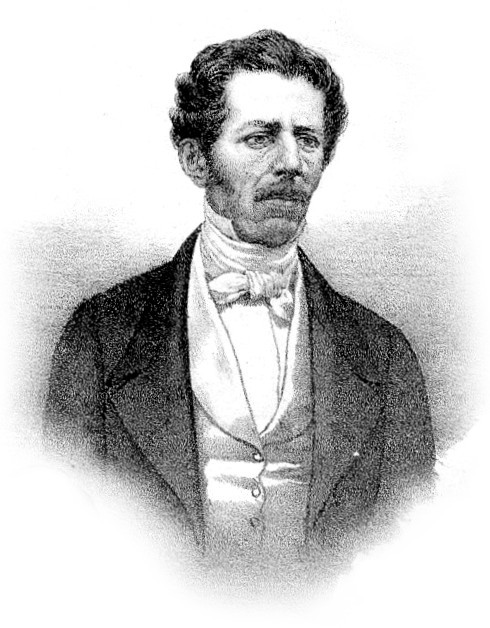 Emilio Bertone di Sambuy